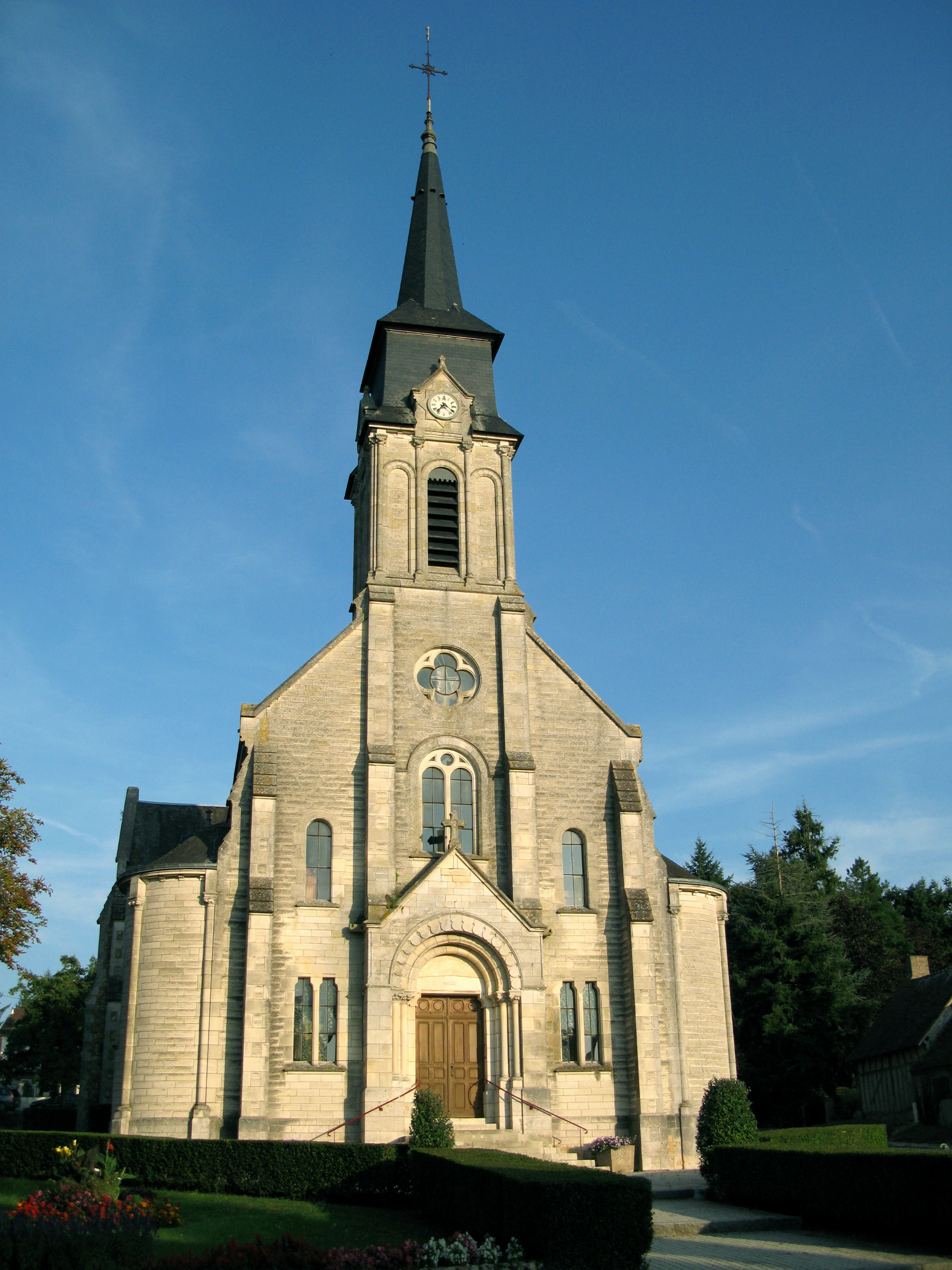 Saint-Florent (Loiret, France) - L'église. . .